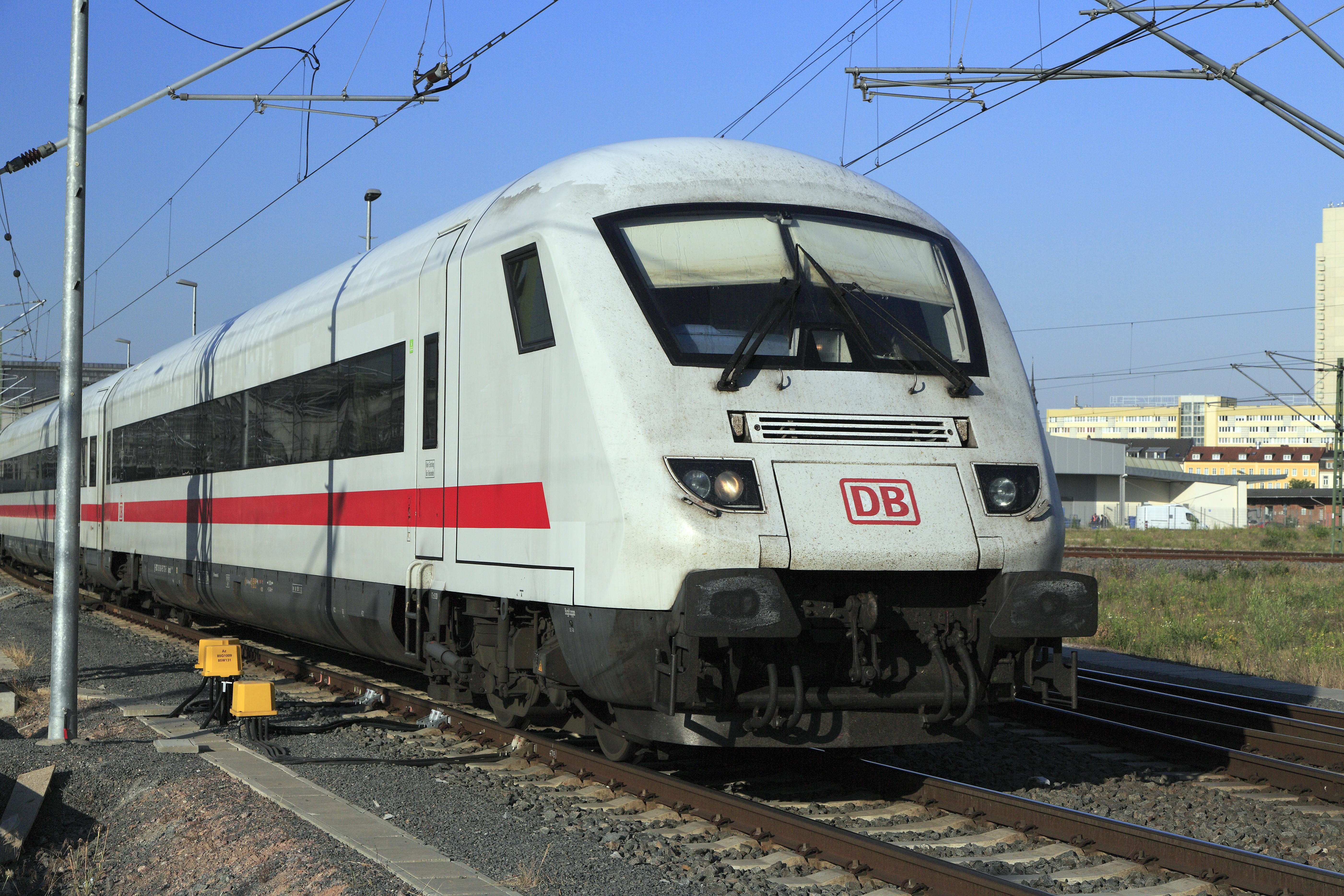 »Triebzug« 930 als ICE 1001 Berlin Gesundbrunnen–München Hbf bei der Weiterfahrt von Leipzig Hbf über das Bahnhofsgleis 98 Richtung Großkorbetha.